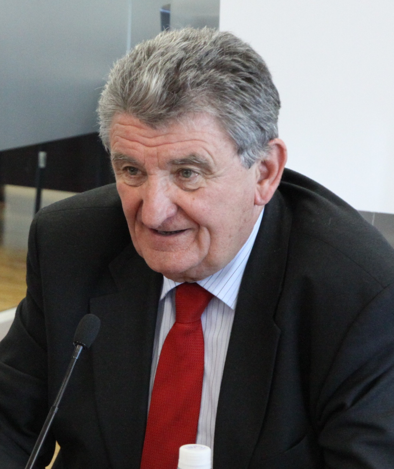 Alain Néri lors d'une visite en Équateur.